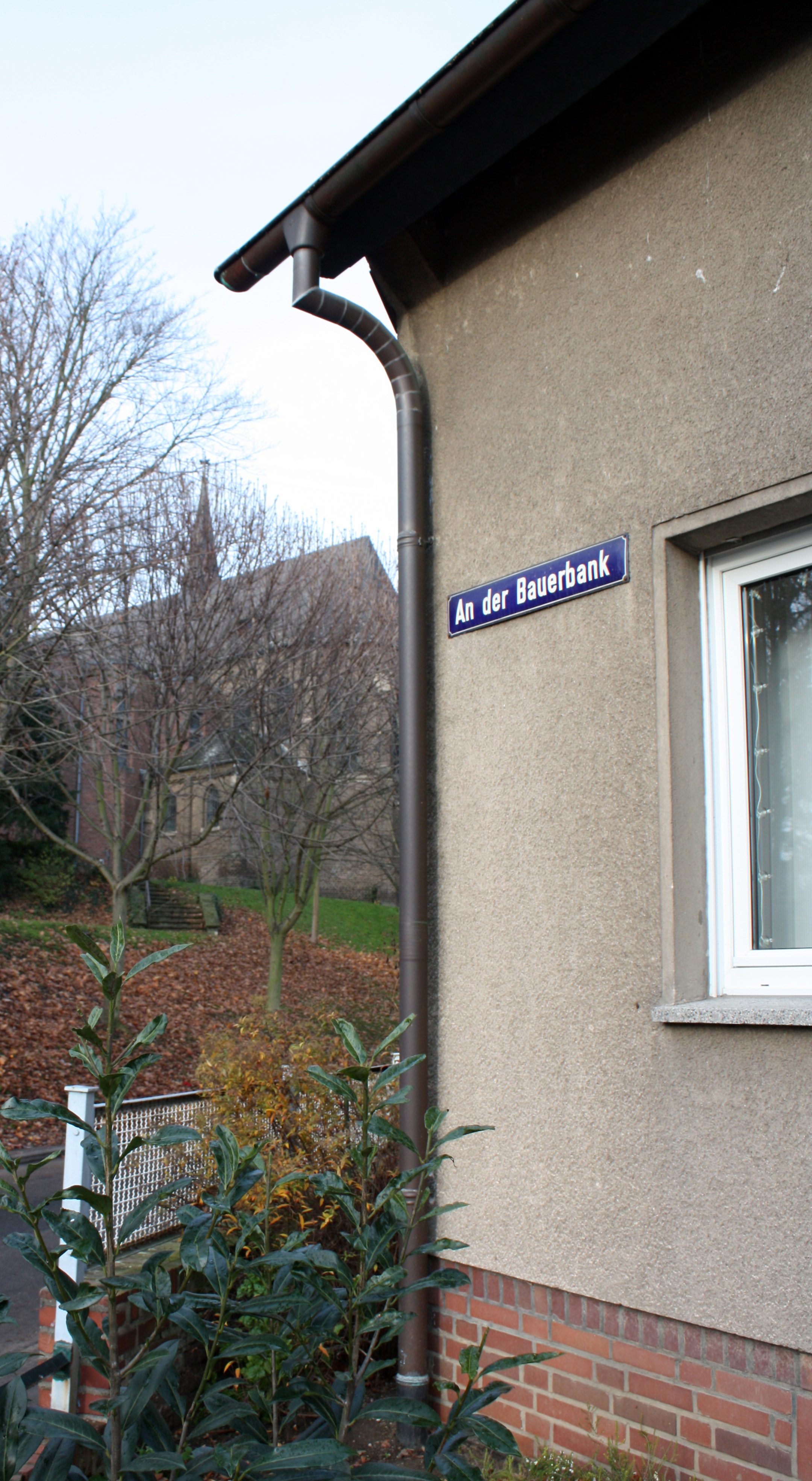 Hürth-Fischenich, "An der Bauerbank"